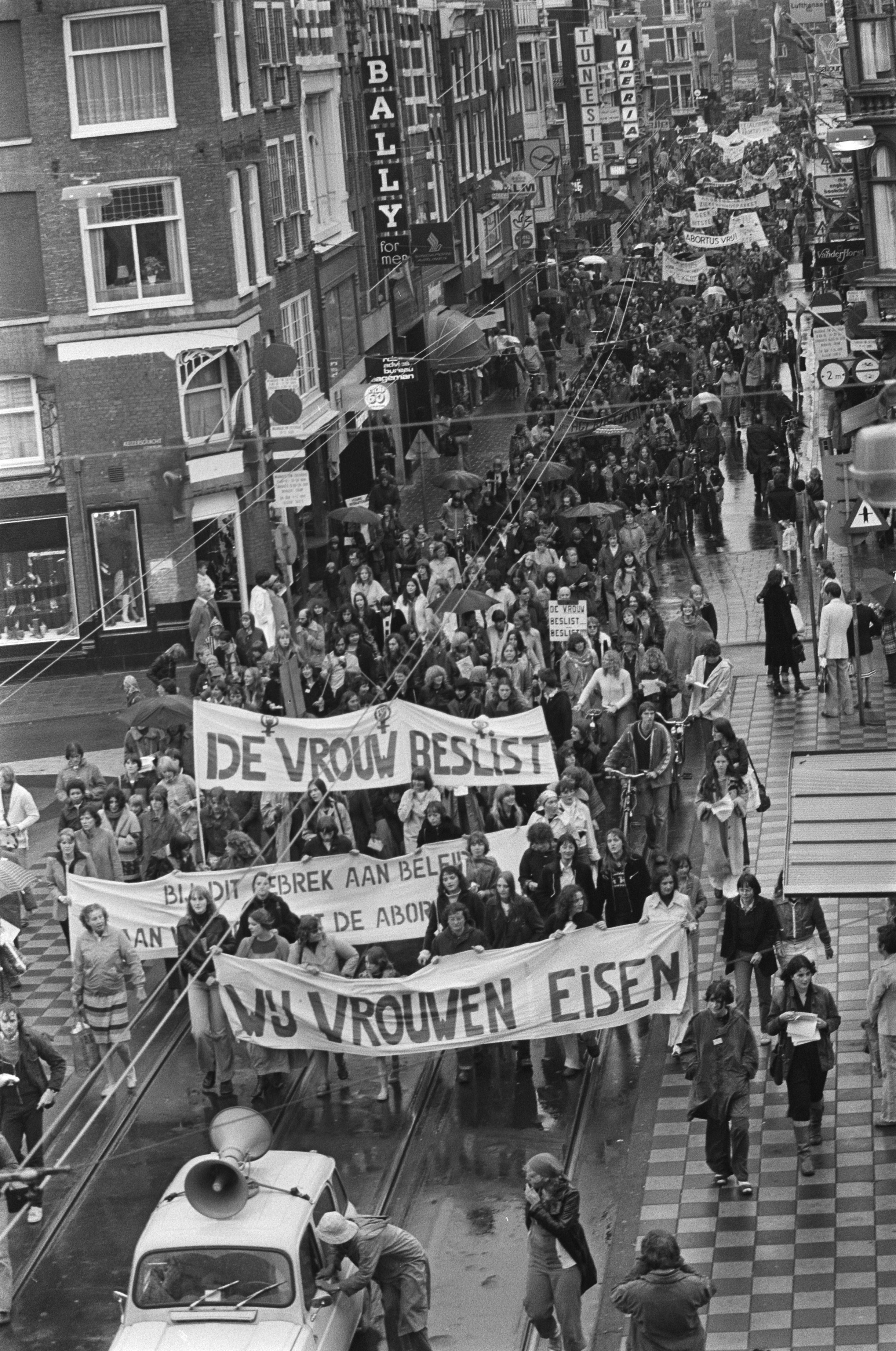 Collectie / Archief : Fotocollectie Anefo Reportage / Serie : [ onbekend ] Beschrijving : Demonstratie voor legalisering abortus in Amsterdam; overzicht Datum : 10 september 1977 Locatie : Amsterdam, Noord-Holland Trefwoorden : abortussen, demonstraties Fotograaf : Verhoeff, Bert / Anefo Auteursrechthebbende : Nationaal Archief Materiaalsoort : Negatief (zwart/wit) Nummer archiefinventaris : bekijk toegang 2.24.01.05 Bestanddeelnummer : 929-3413